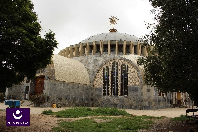 Iglesia Santa María de Sión